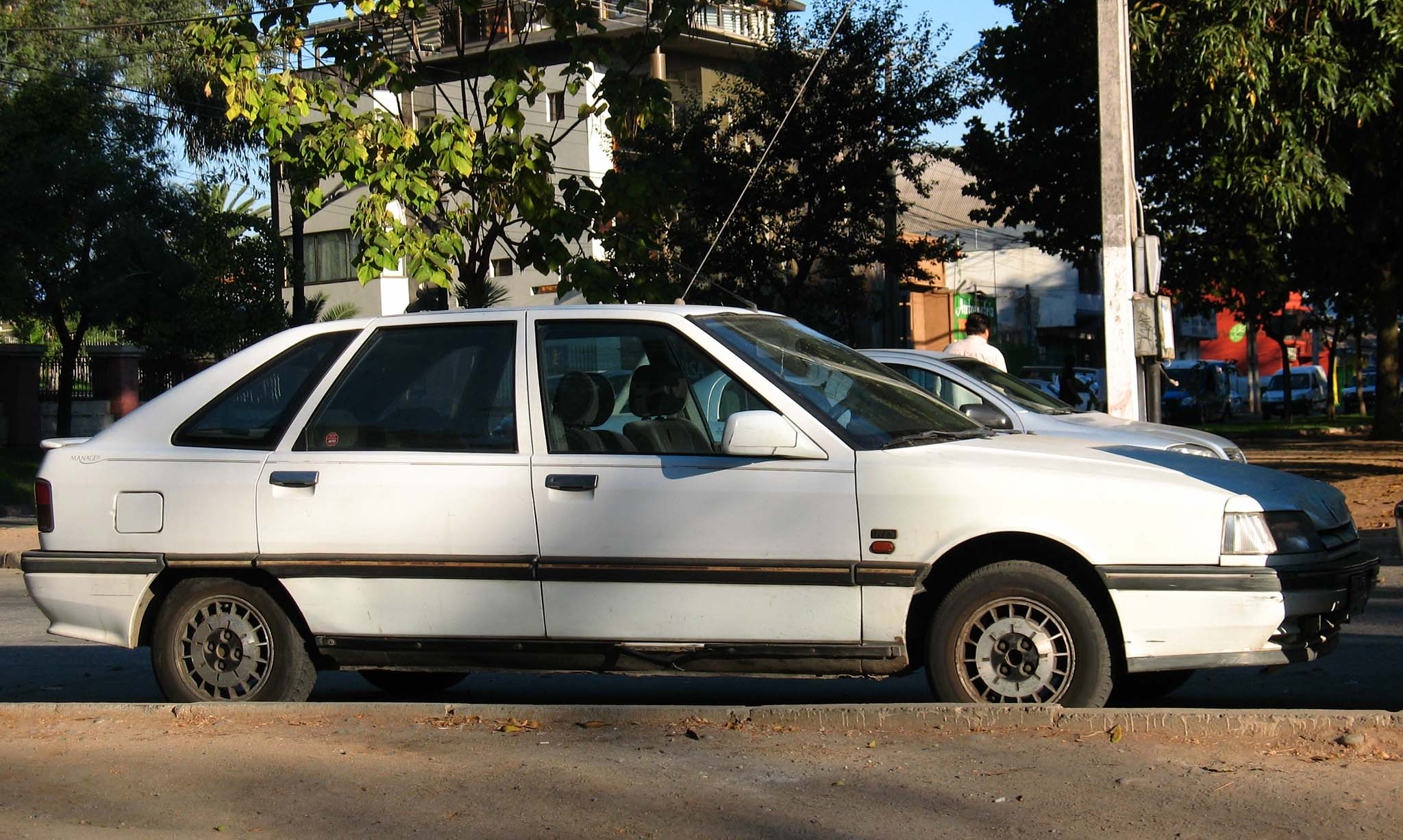 renault 21 manager